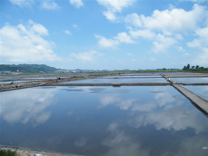 下尾的盐埕 2009.7.30